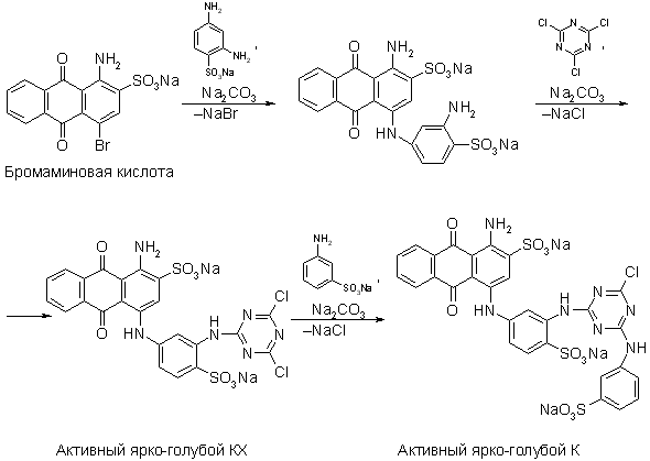 Схема синтеза дихлортриазинового активного антрахинонового красителя Активного ярко-голубого КХ и монохлортриазинового активного антрахинонового красителя Активного ярко-голубого К